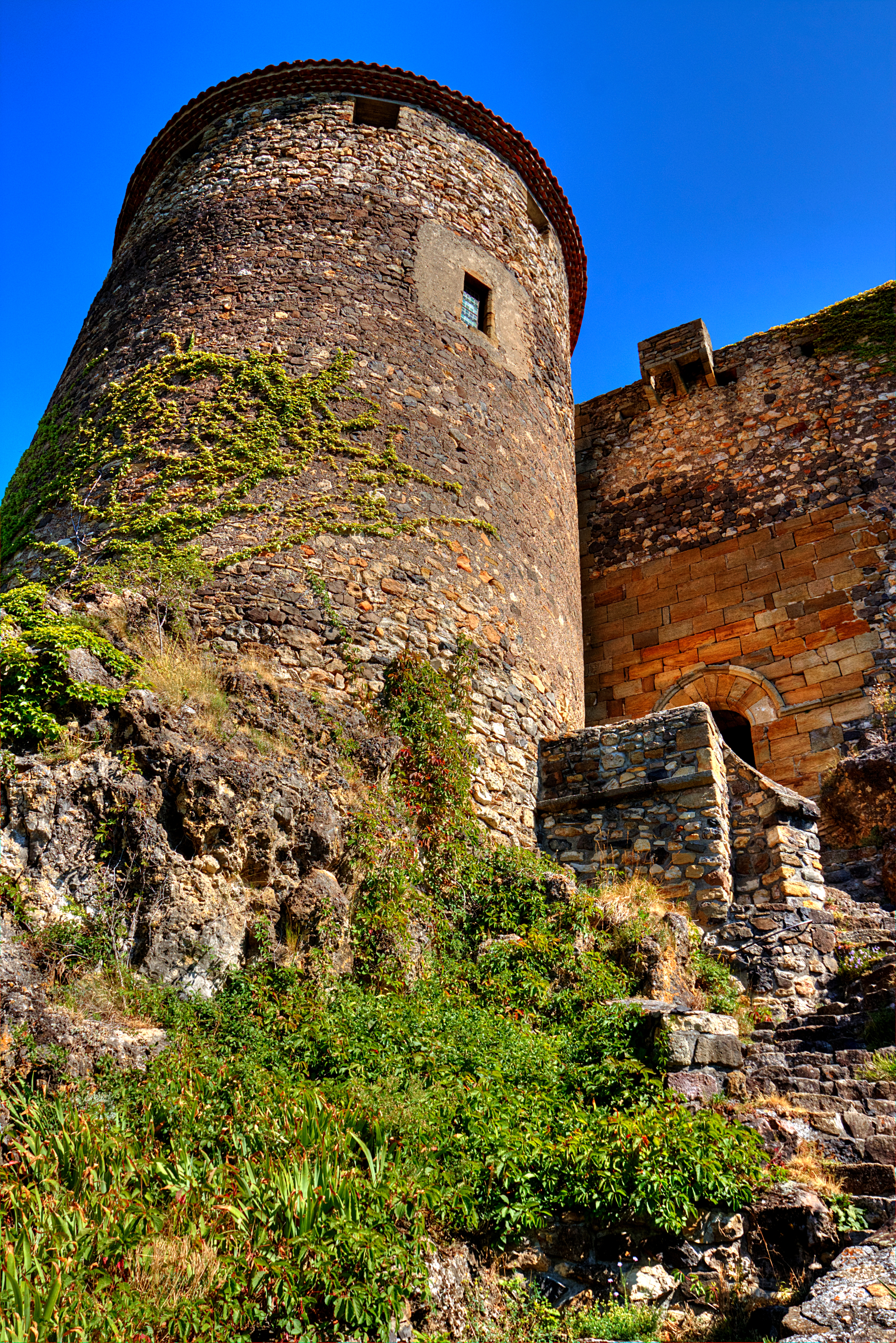 Château de Busséol, XIIème siècle, Busséol